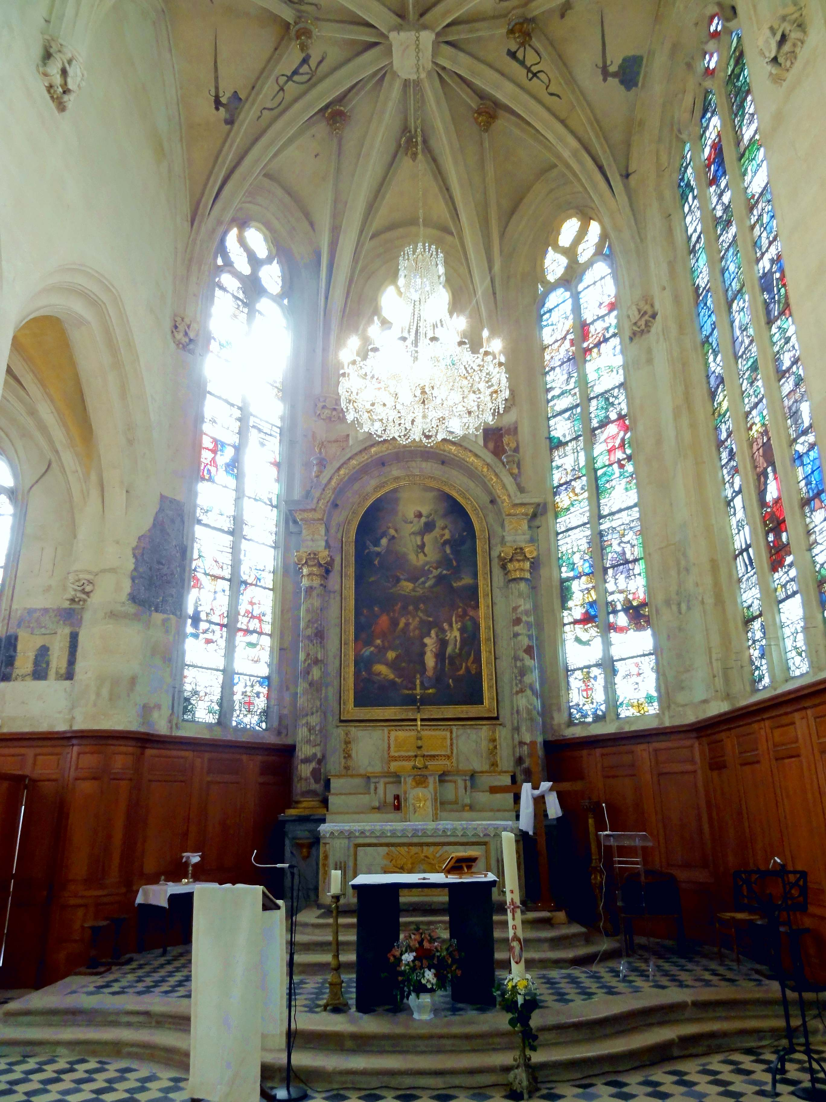 Intérieur de l'église - voir titre.